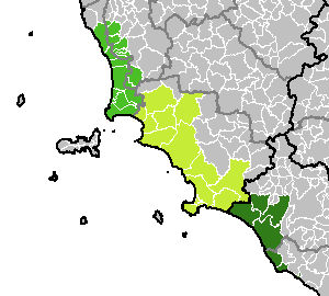 Comuni indicati in [1] A nord Maremma Pisana (o Livornese), al centro Maremma Senese (o Grossetana), a sud Maremma Laziale